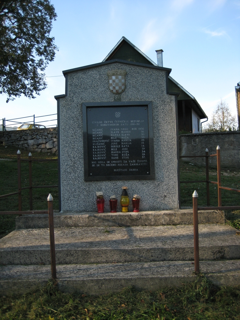 Spomenik civilnim žrvama domovinskog rata u Dabru, Croatia